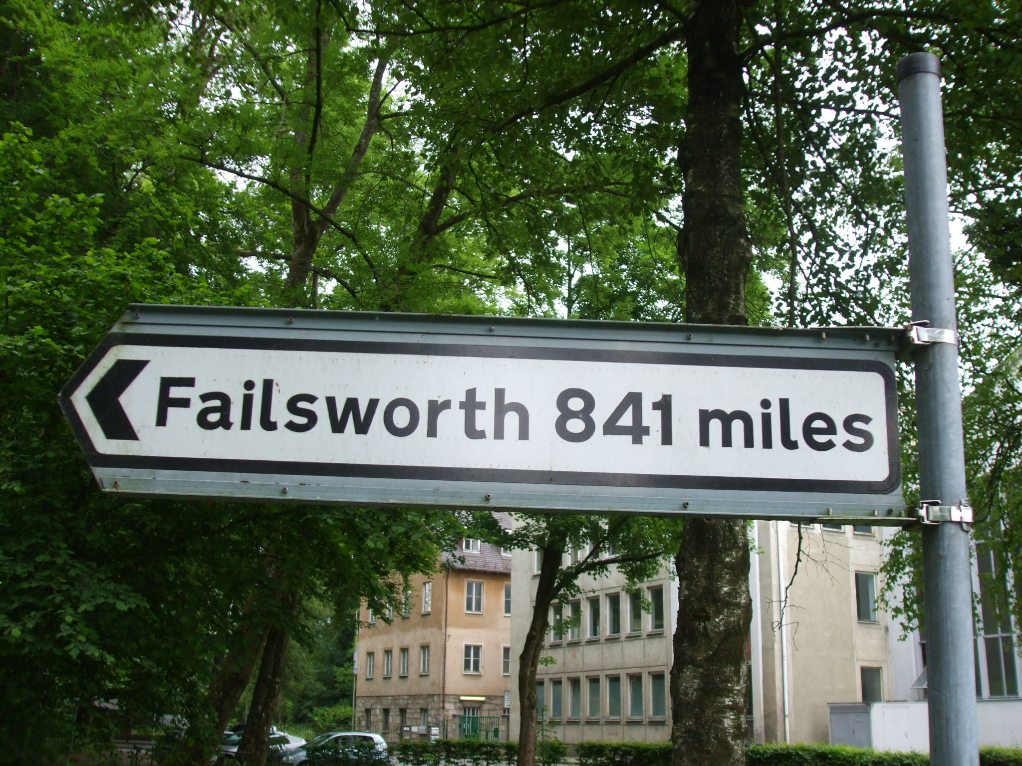 Wegweiser nach Failsworth, einer Partnerstadt von Landsberg am Lech. Standort: am Landsberger Mutterturm